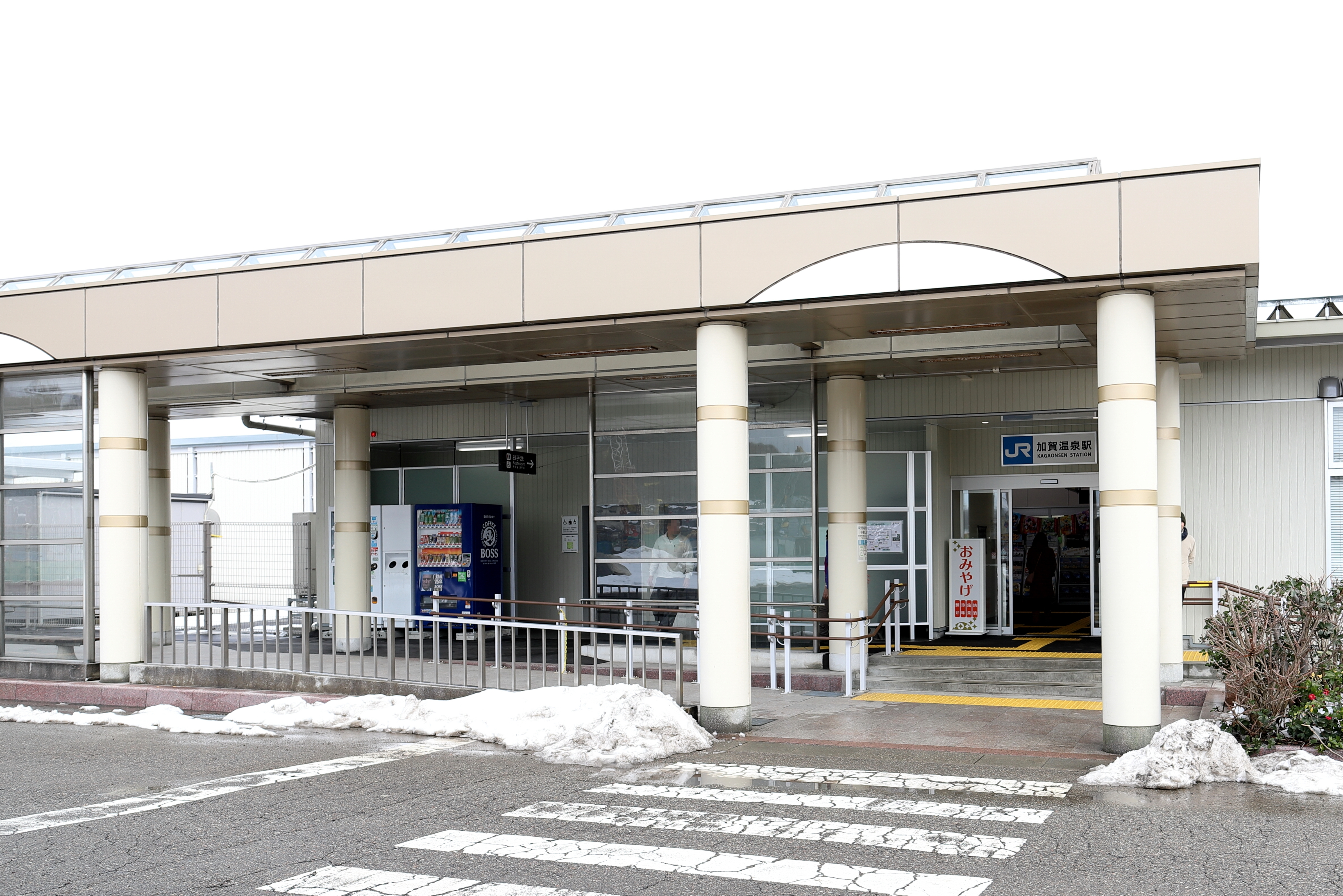 加賀温泉駅 仮設駅舎 西口 Canon EOS 6D Mark II